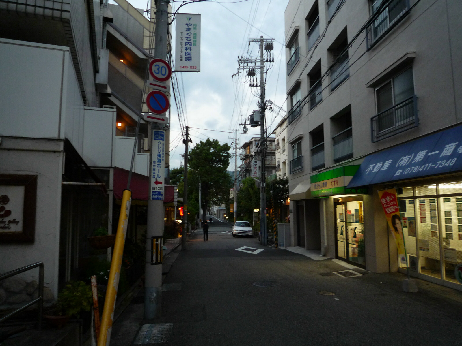 Uozaki